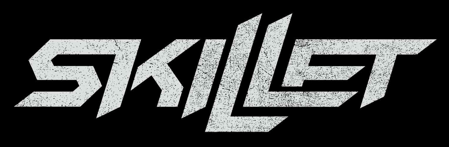 Логотип Skillet